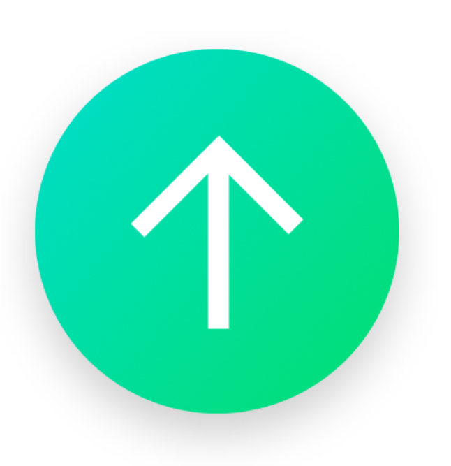 Icono de subida del Billboard